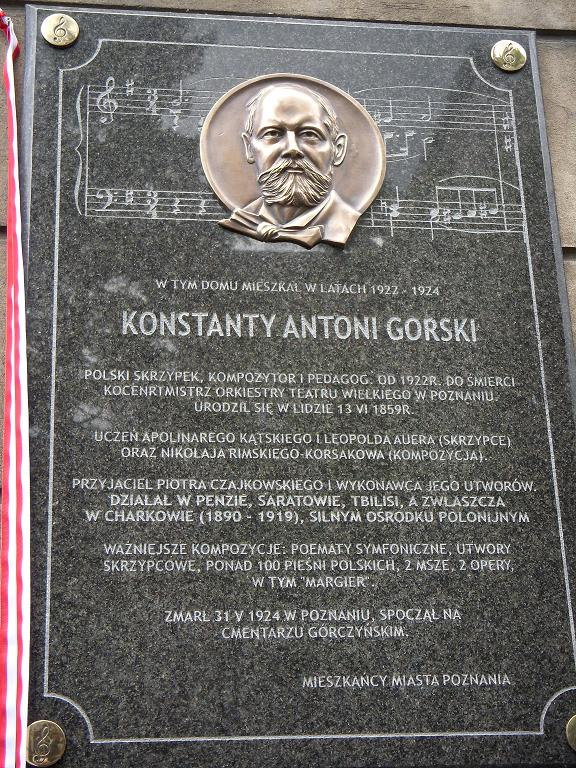 Tablica pamiątkowa, poświęcona Konstantemu Gorskiemu na budynku przy ul. Niegolewskich 24 w Poznaniu